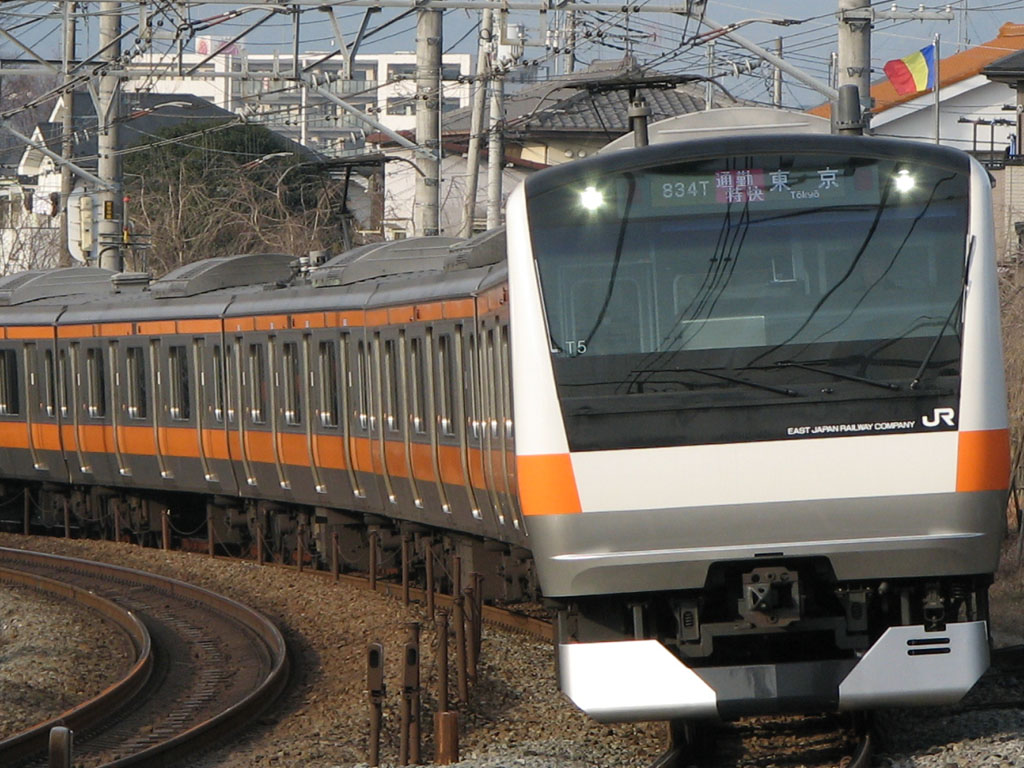 E233系で運行される中央線快速 通勤特快 東京行 (八王子～豊田間)